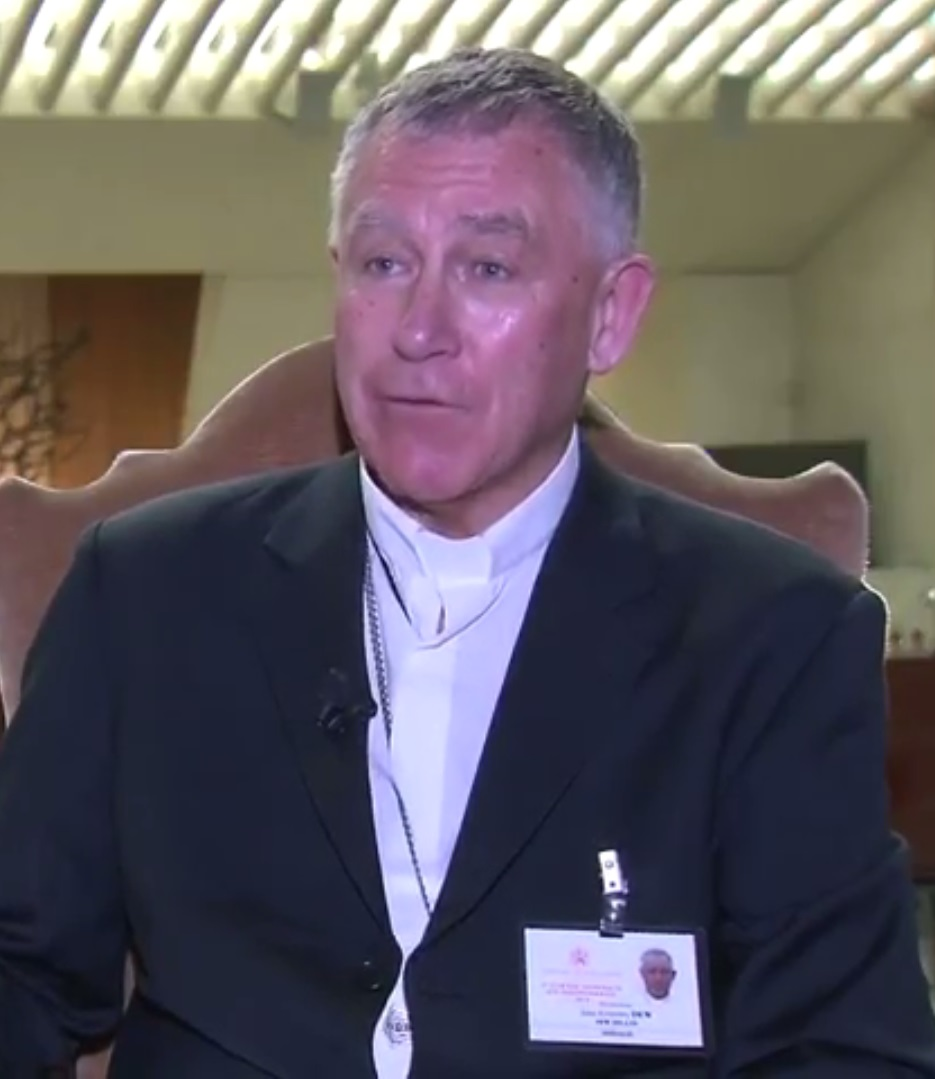 Mgr John Atcherley Dew durant une interview au cours du Synode des évêques sur les défis pastoraux de la famille dans le contexte de l'évangélisation en octobre 2014 au Vatican.